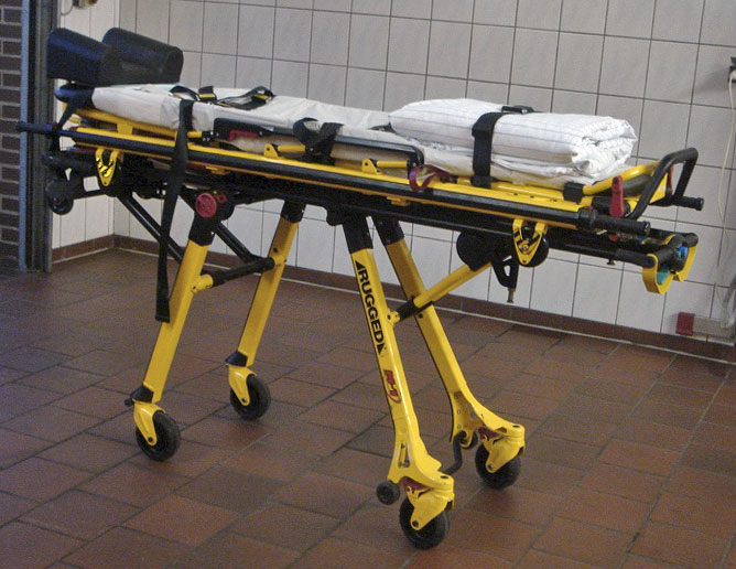 Stryker Roll-In-Trage